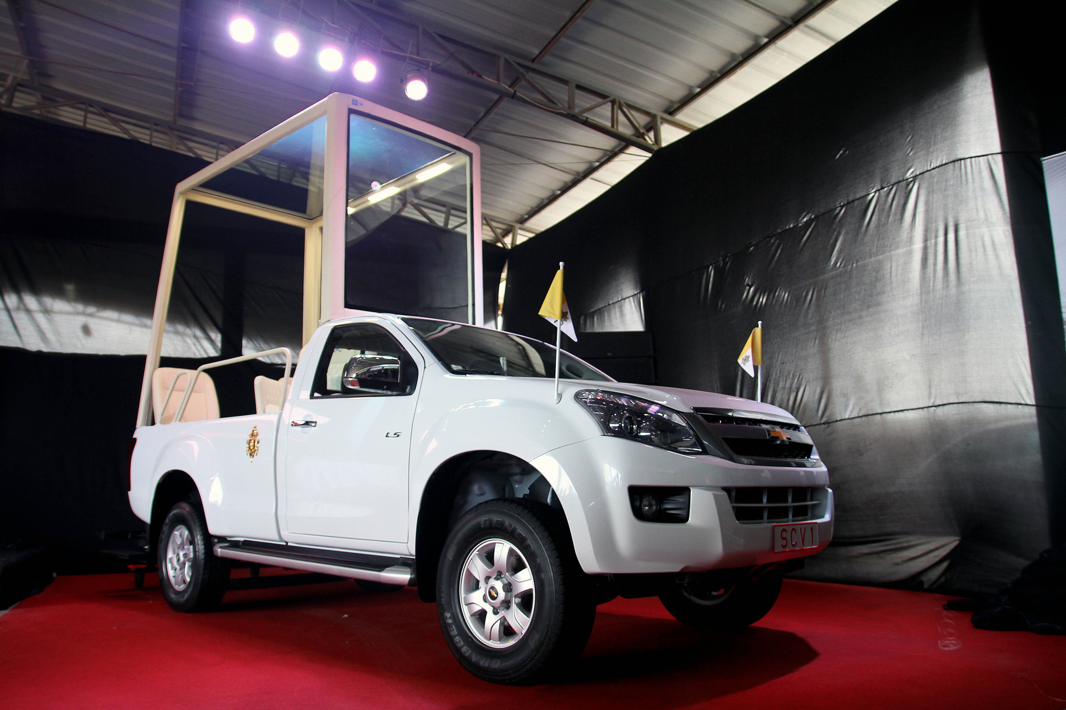 Guayaquil, 01 de jul del 2015 (Andes).-En el Fuerte Militar Huancavilca se realizó la presentación, entrega y bendición del vehículo que usará el papa Franscisco durante su estadia en Guayaquil Foto:César Muñoz/Andes